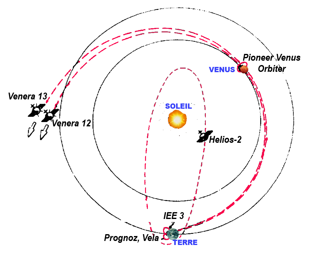 First Interplanetary Network